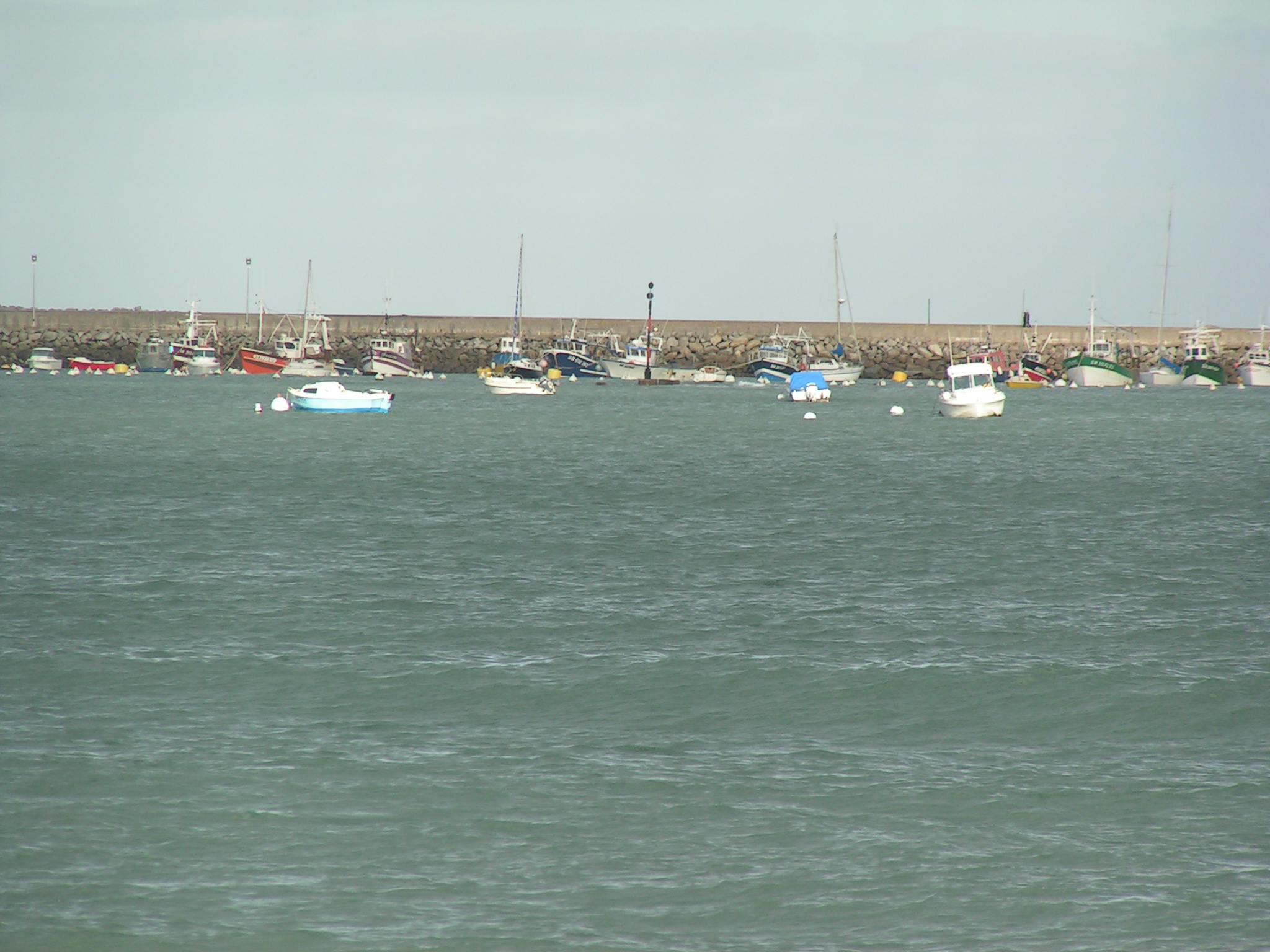 Port de Saint-Cast-le-Guildo